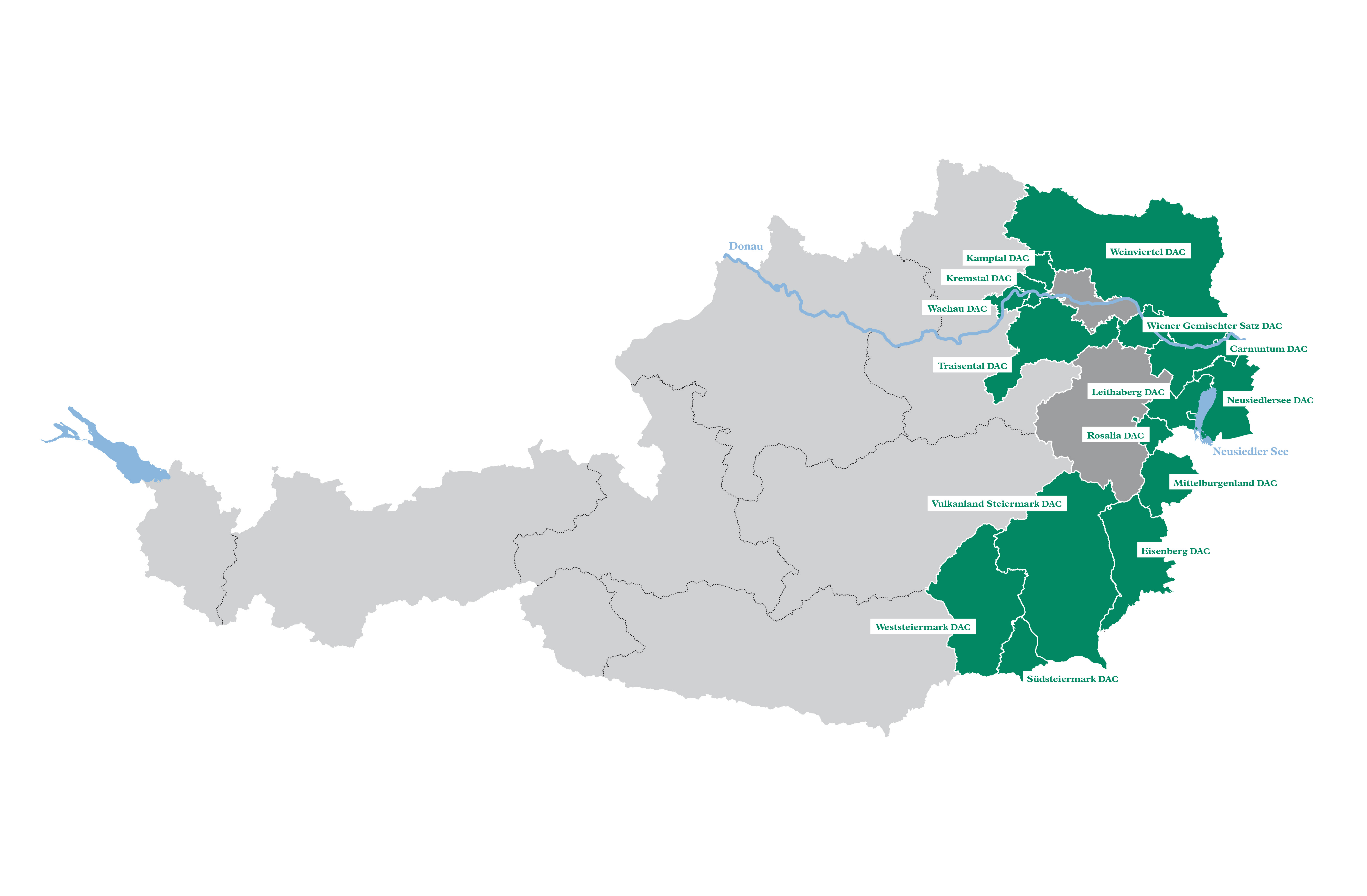 Eine Karte der österreichischen DAC-Weinbaugebiete (grün) mit Stand Mai 2020.